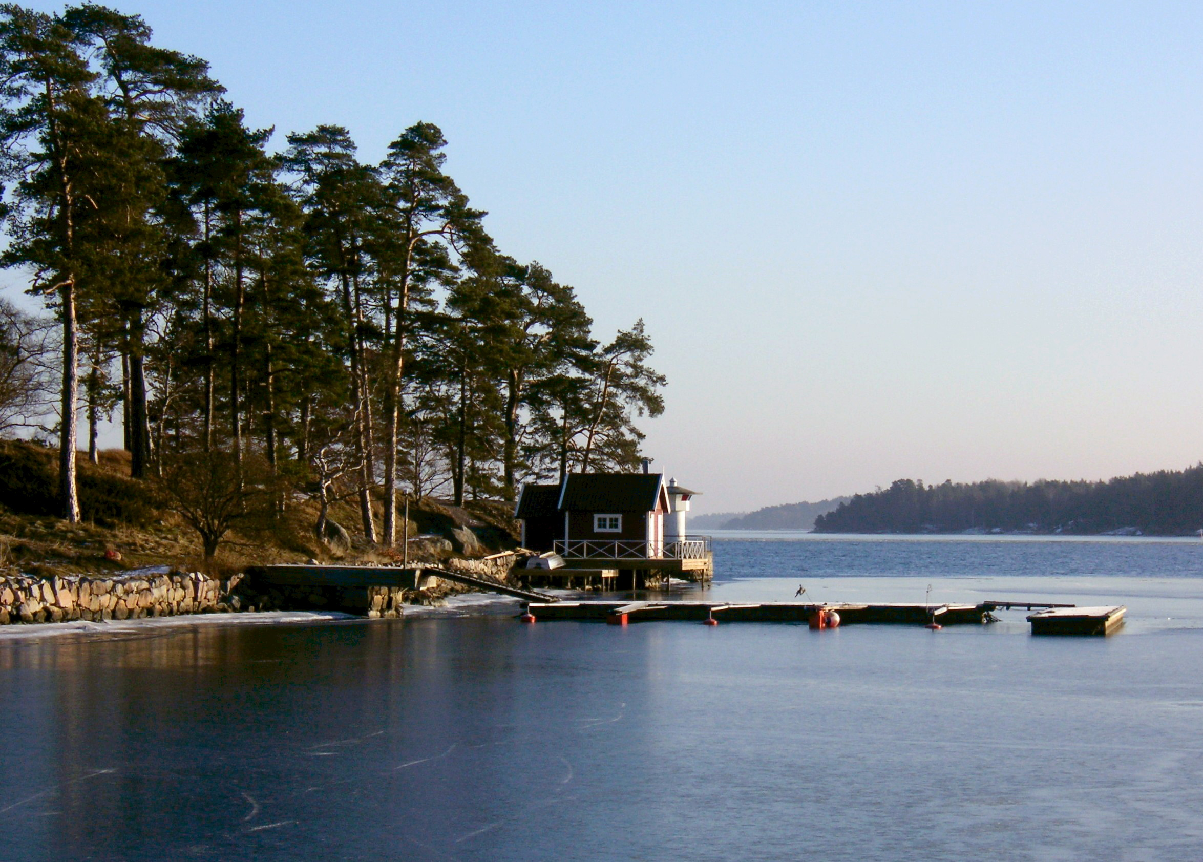 Stora Värtan i Danderyd och Djursholm